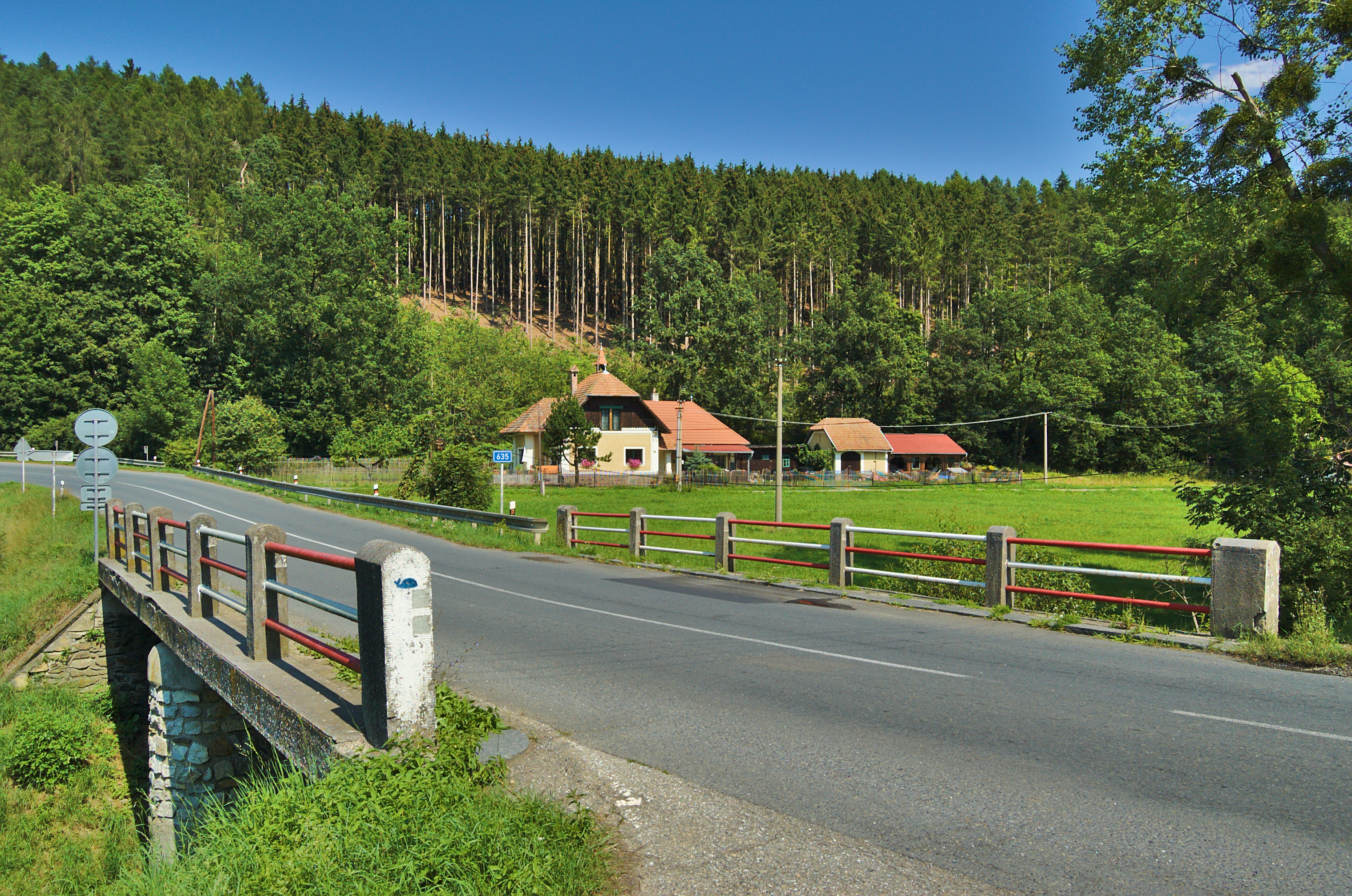 Přírodní památka Třesín, okres Olomouc